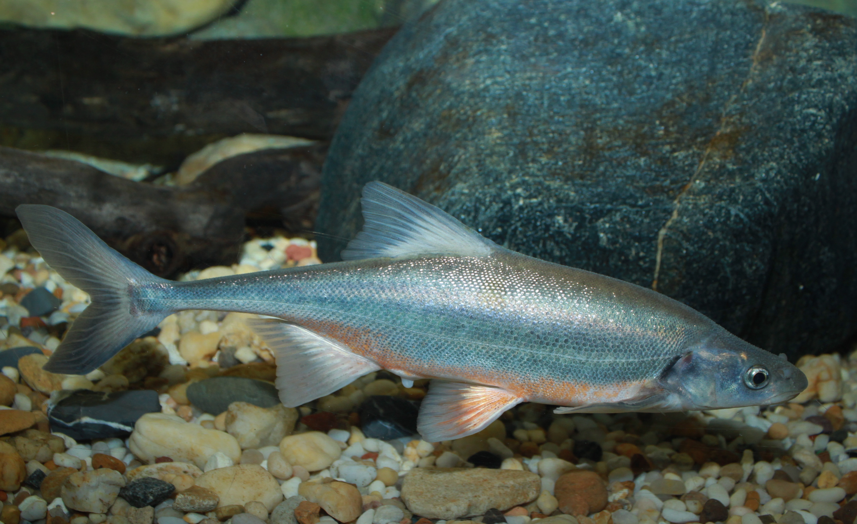 bonytail chub or bonytail, Gila elegans